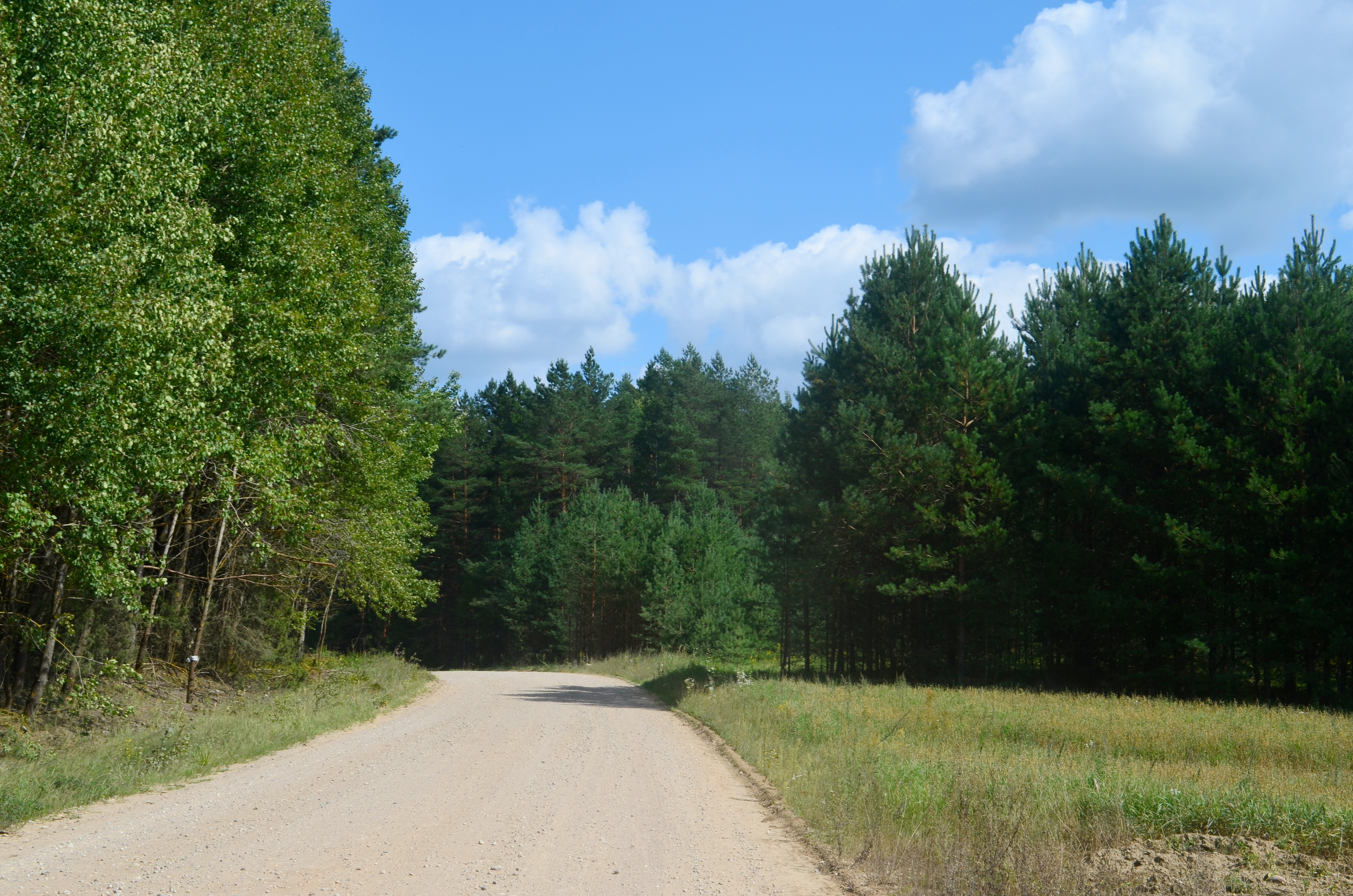 Barovkos miškas, Šalčininkų raj.